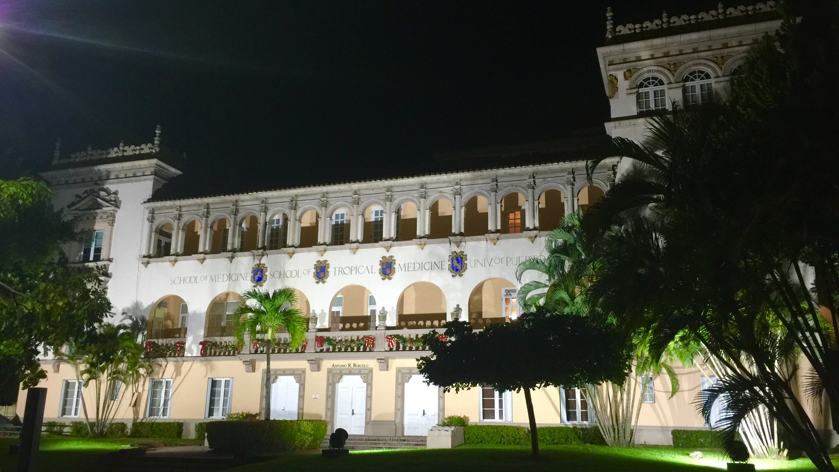 Escuela de Medicina Tropical de la Universidad de Puerto Rico